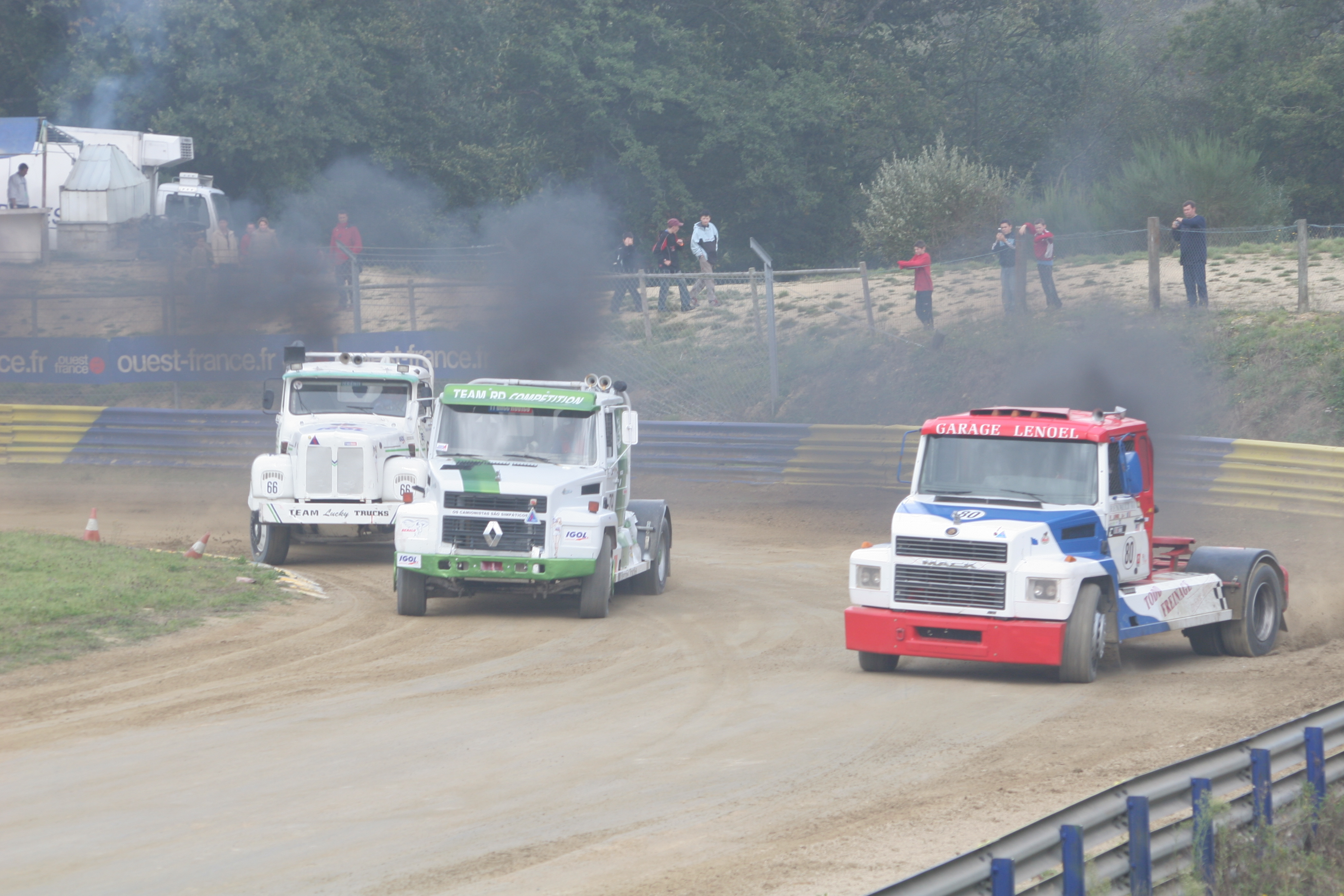 les super camioncross en piste